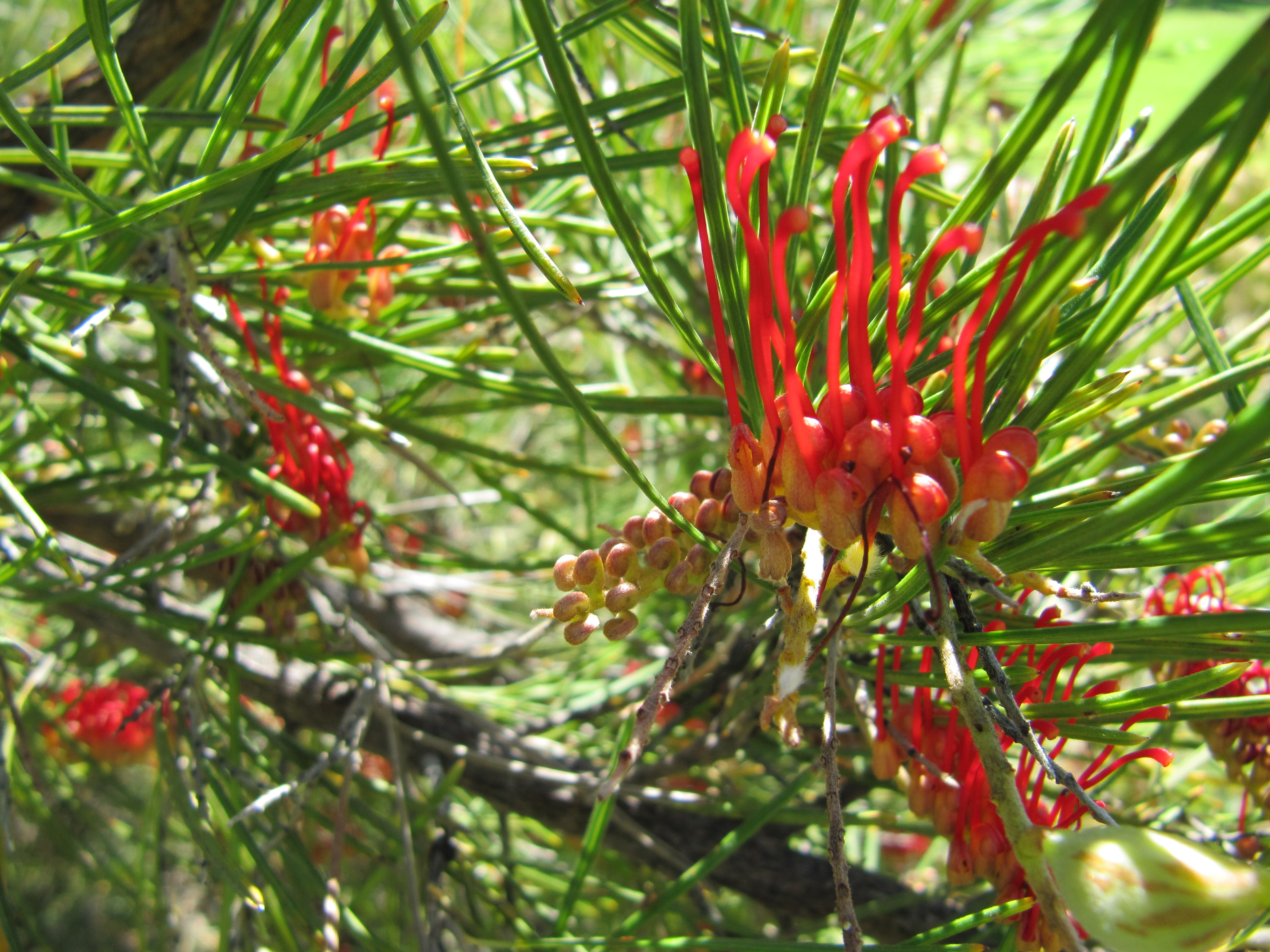 Fleurs